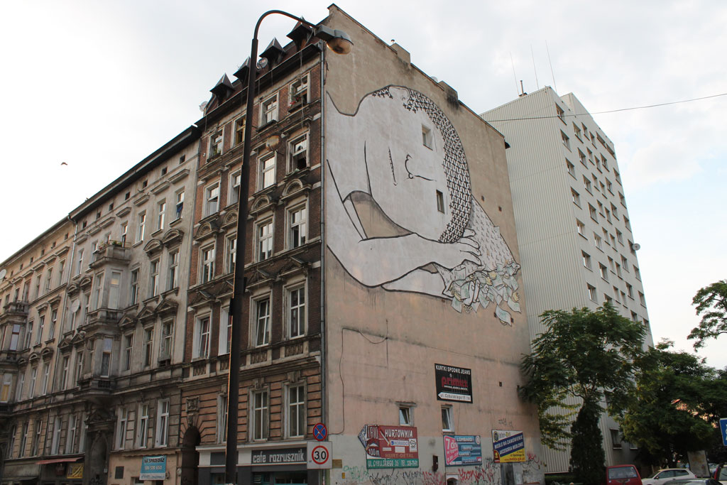 Ejemplo de una de las múltiples pinturas urbanas que hay alrededor de toda la ciudad de Breslavia.